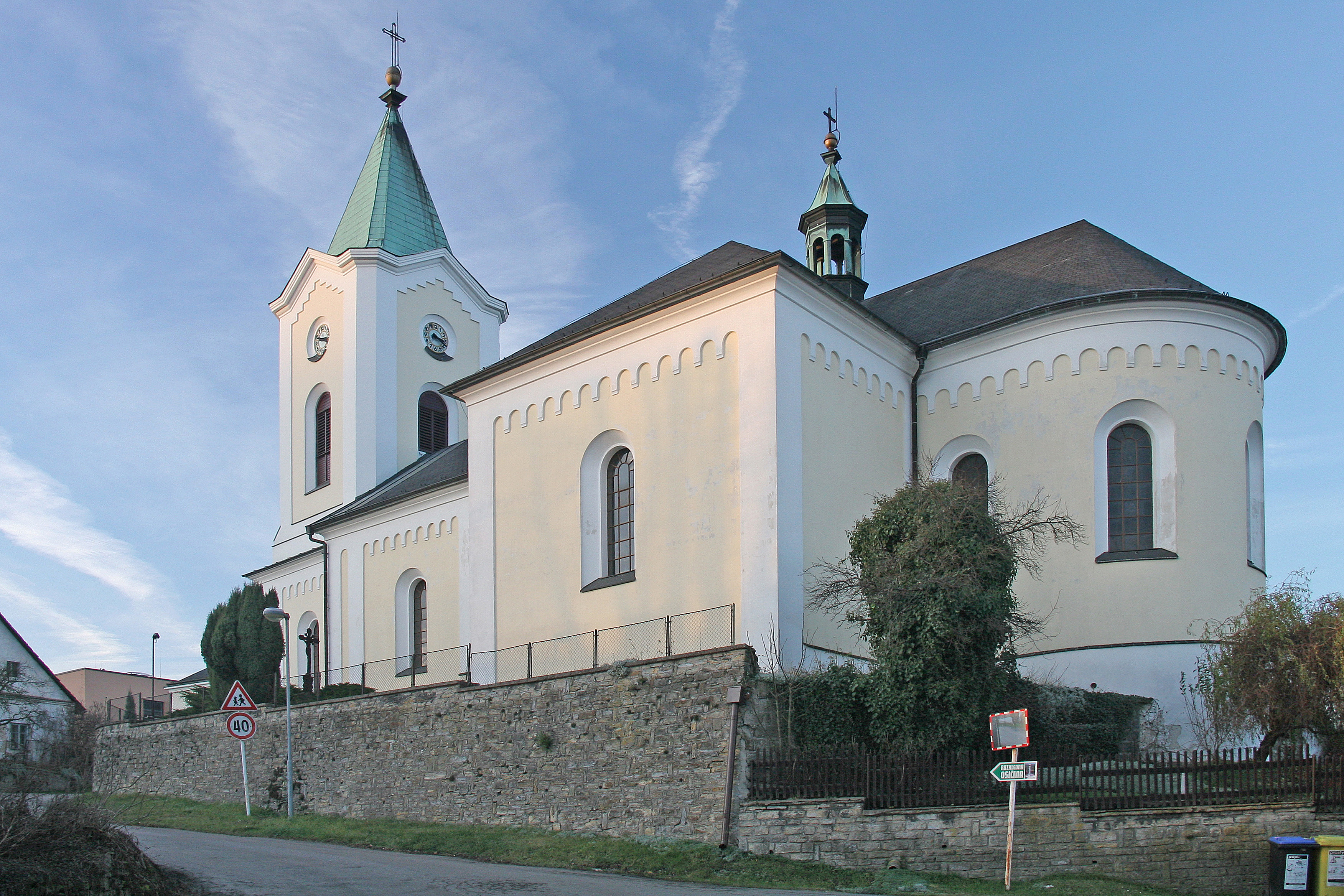 Voděrady kostel svatého Petra a Pavla